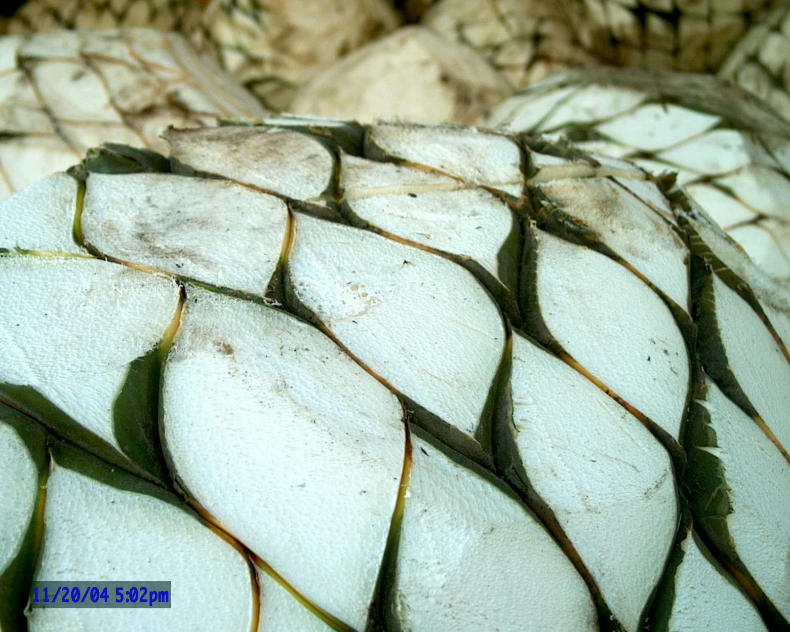 Pina de Agave, Tequila Jalisco, 20 Diciembre 2004, By Mario Jareda Beivide